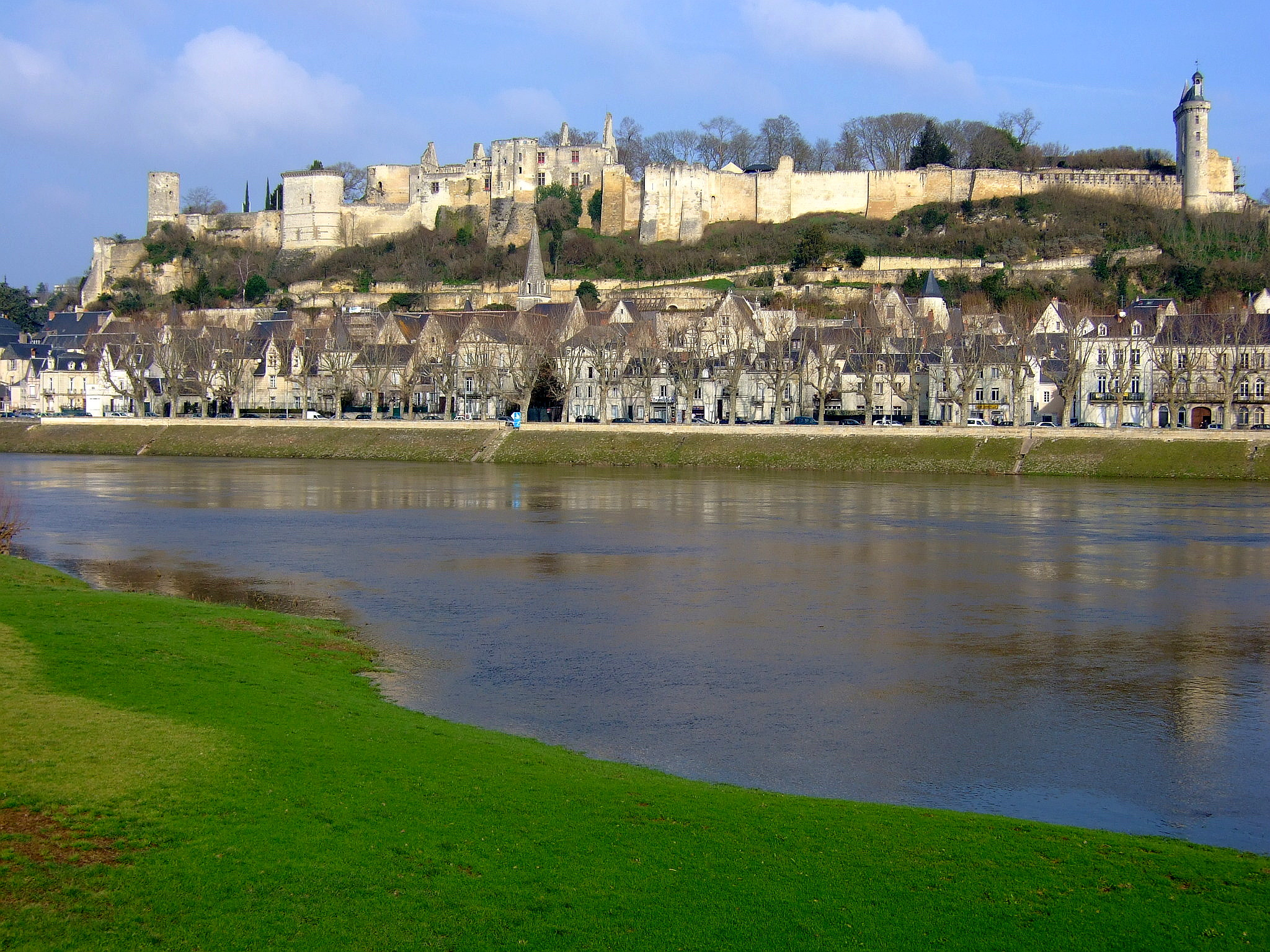 Le château de Chinon et la Vienne